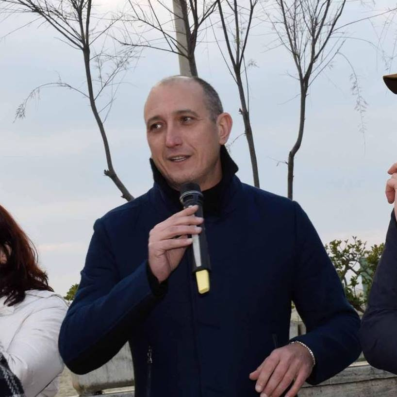 Alessio De Giorgi a Viareggio, febbraio 2016